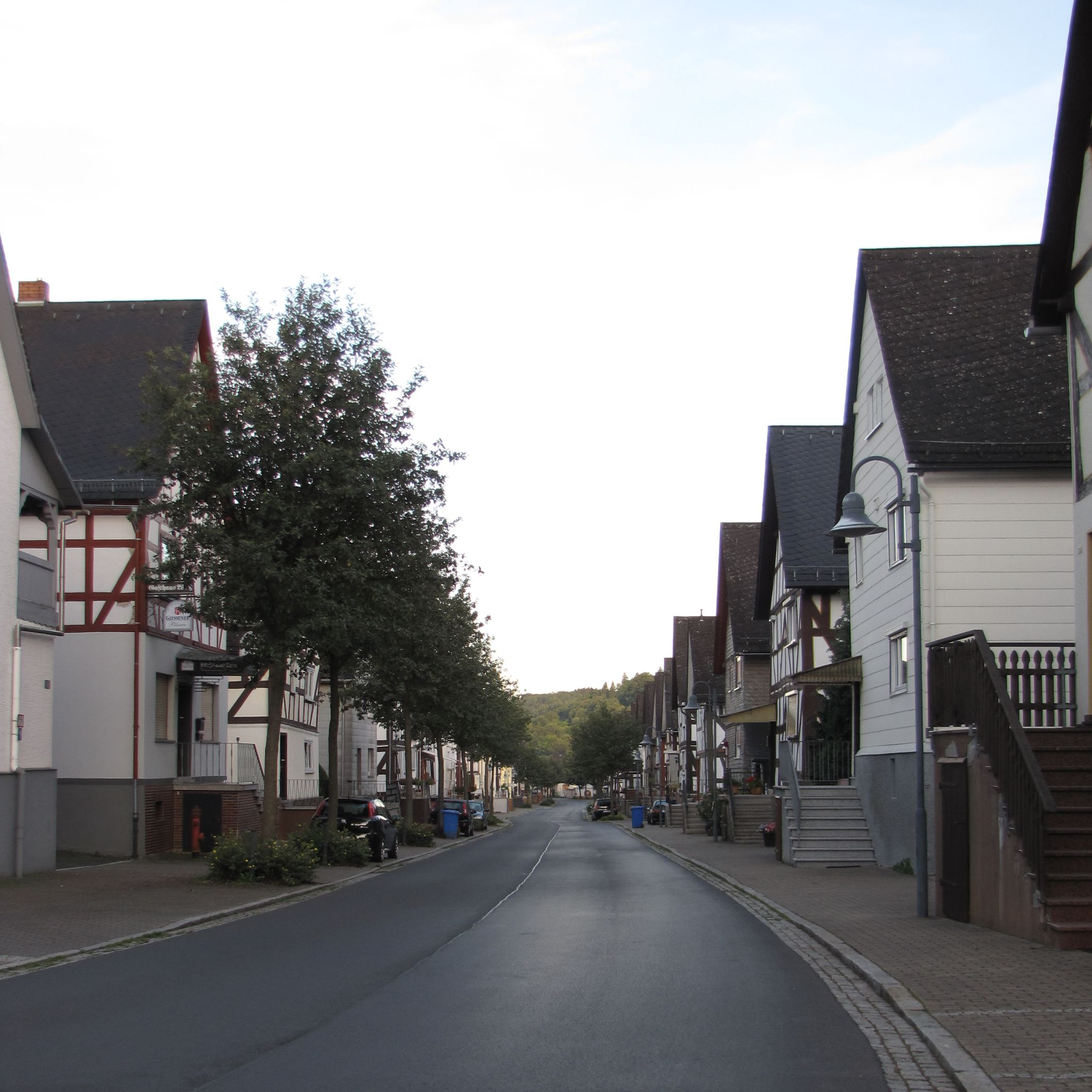 Hauptstraße in Nanzenbach